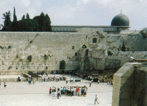 De Al Aqsa-moskee zoals gezien vanaf de trappen naar het plein voor de 'Klaagmuur', scan van eigen foto uit oktober 1991.